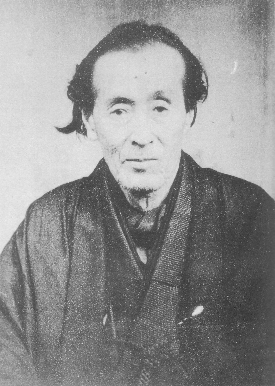 a Japanese writer,薄田斬雲（Zanun Usuda）